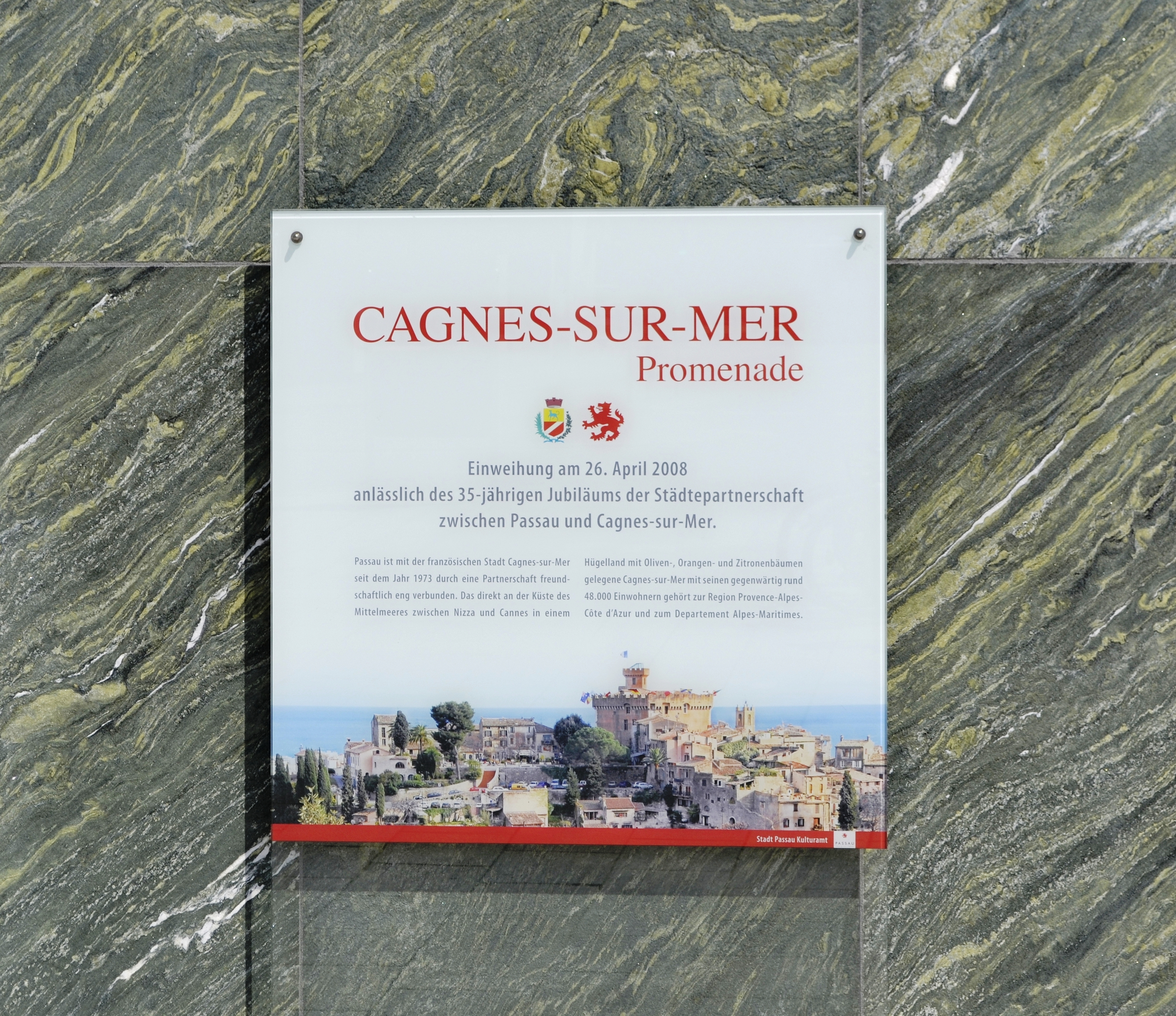 Infotafel am Stadtturm über die Passauer Partnerstadt Cagnes-sur-Mer.